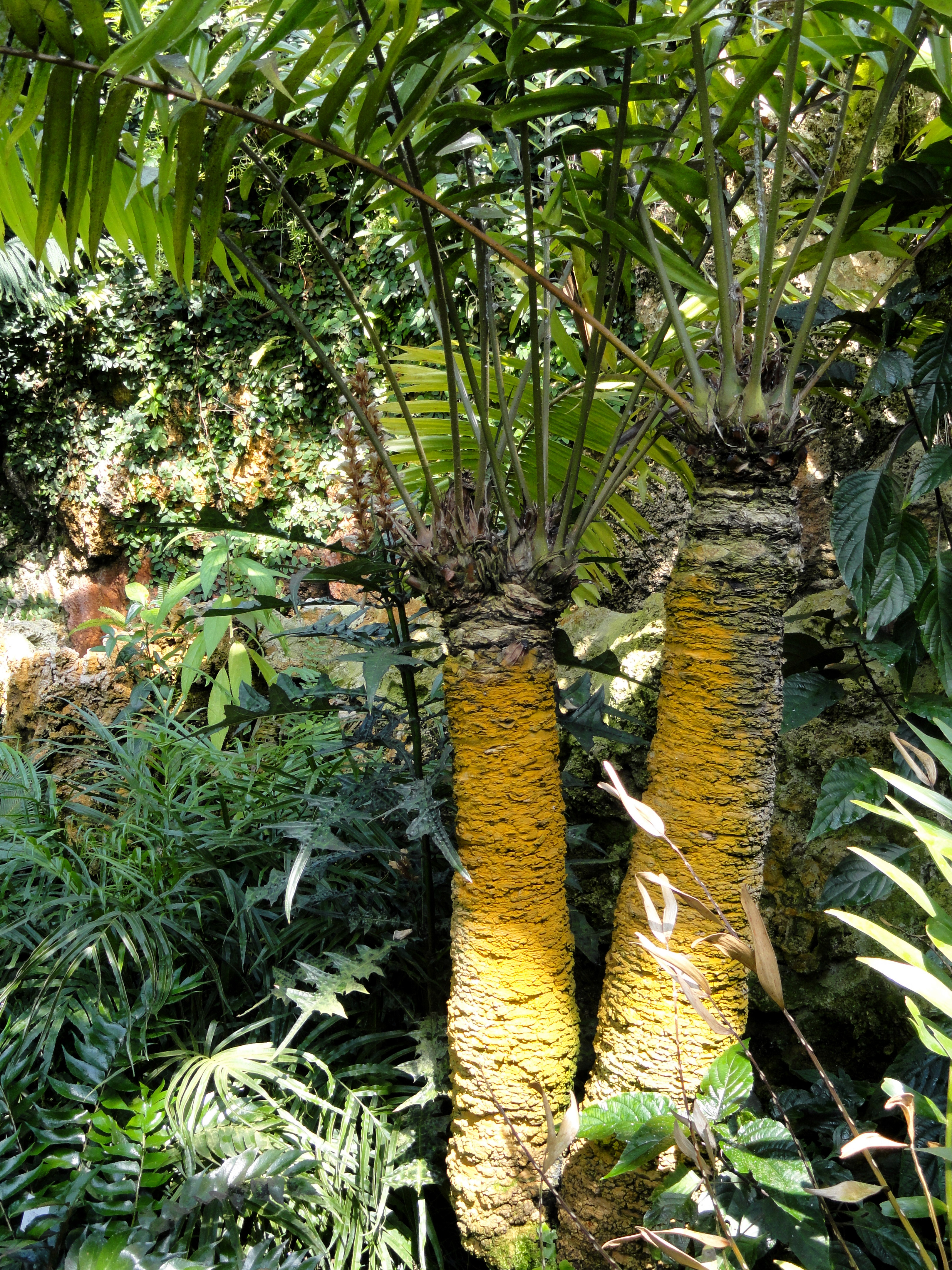 Zamia lindenii specimen in the Botanischer Garten München-Nymphenburg, Munich, Germany.